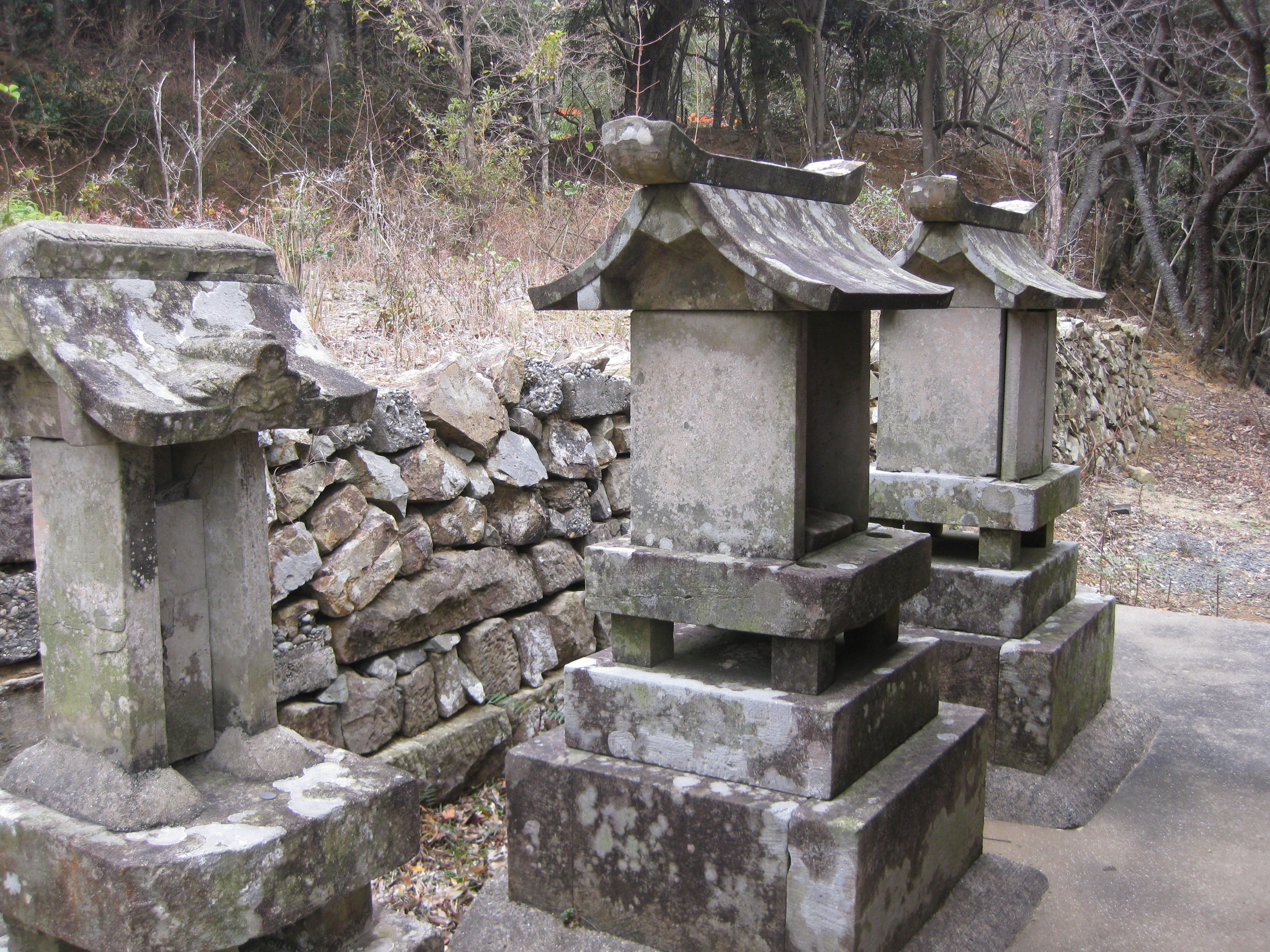 新上五島町間伏郷 頭子神社